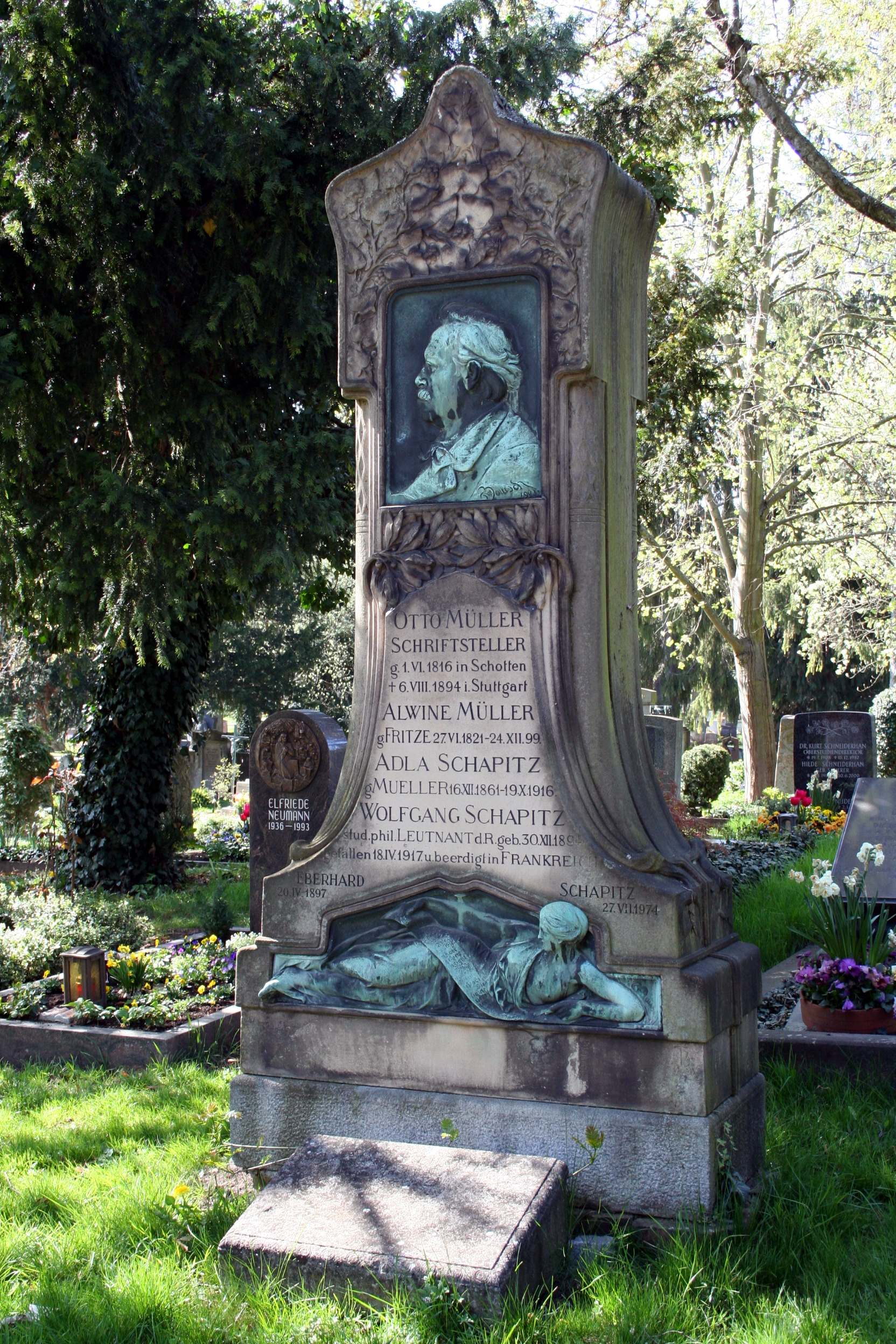 Grab des Schriftstellers Otto Müller auf dem Pragfriedhof in Stuttgart, Abteilung 25